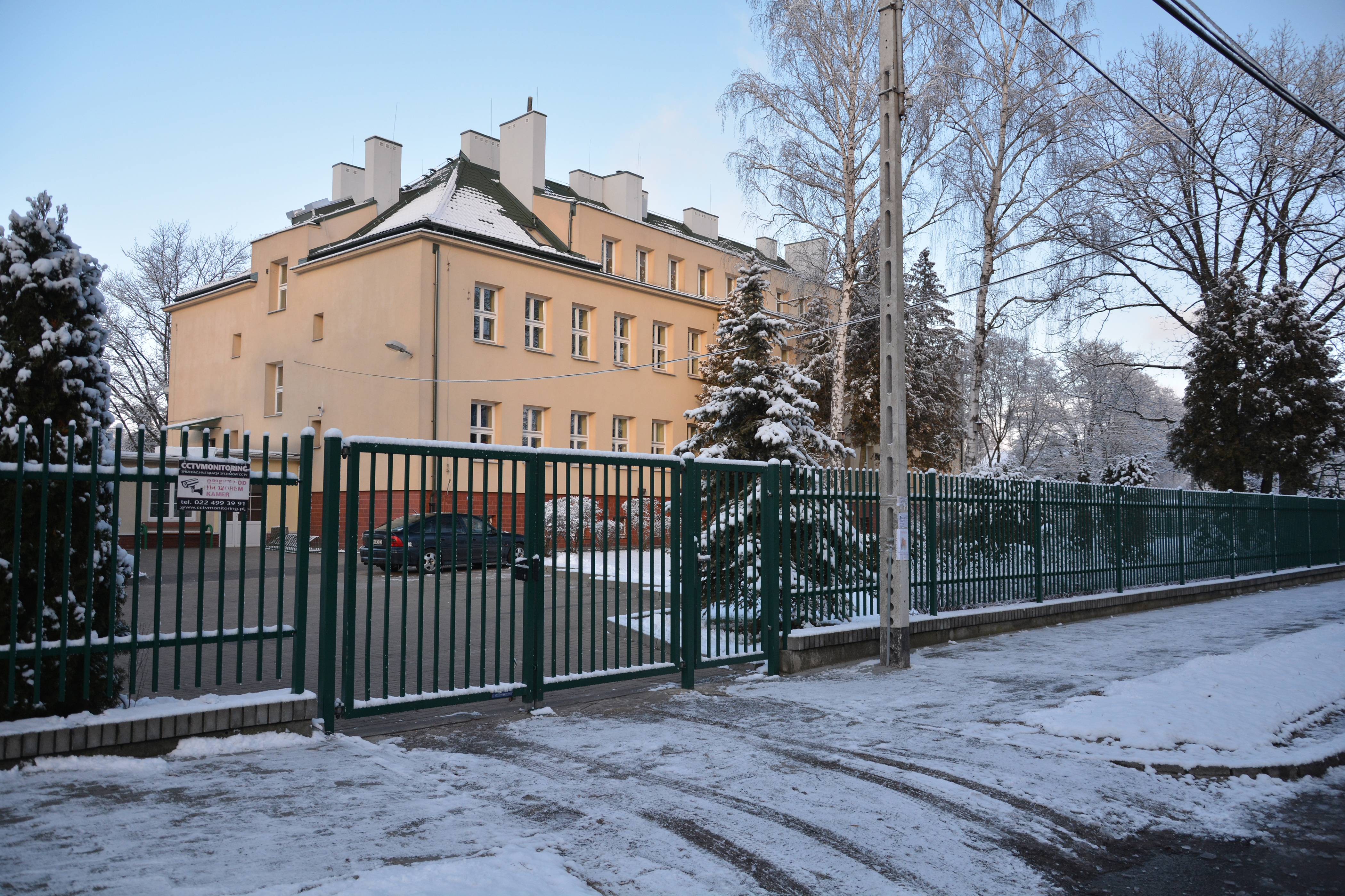 Gimnazjum w warszawskiej Choszczówce